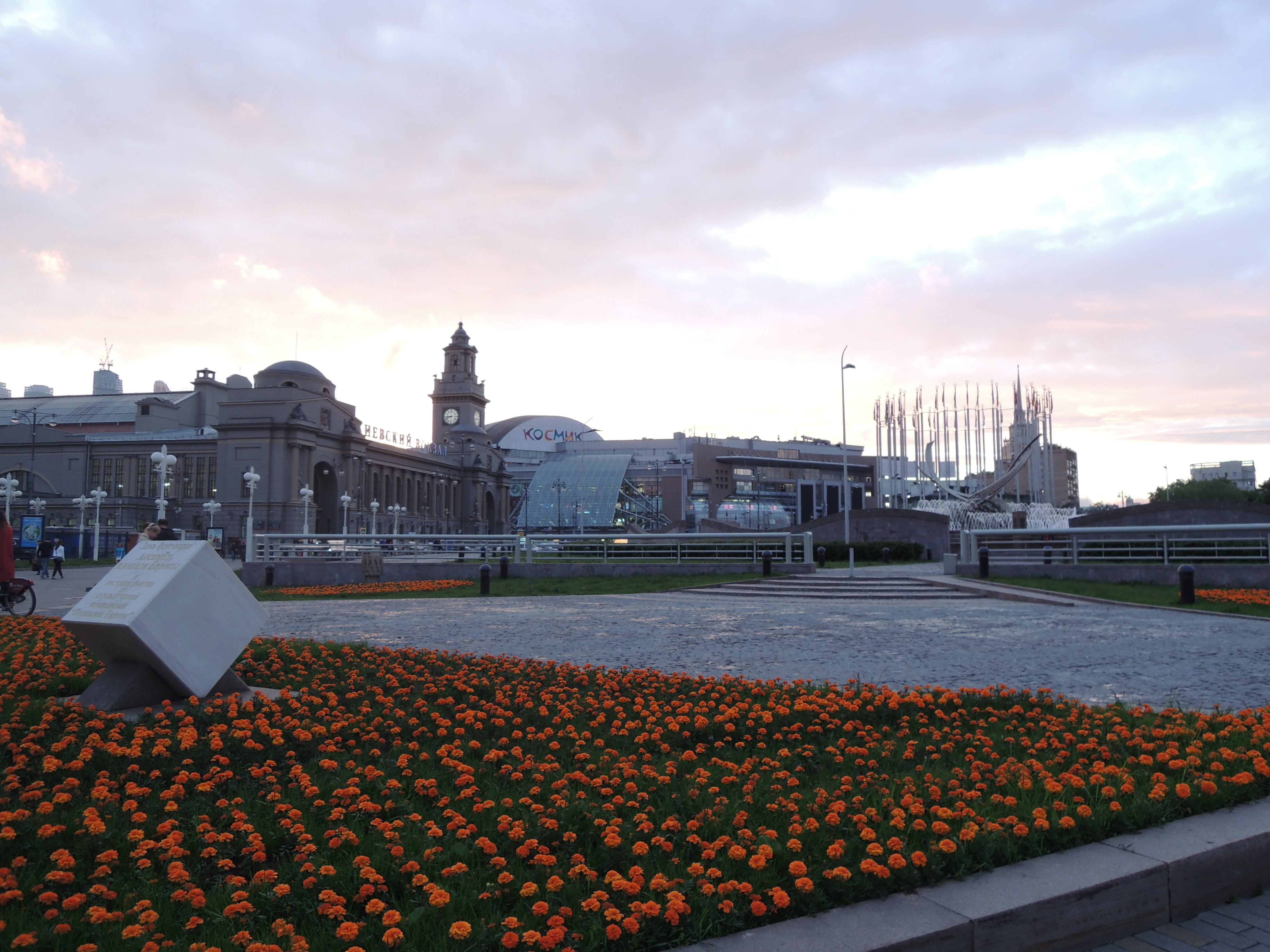 Площадь Европы